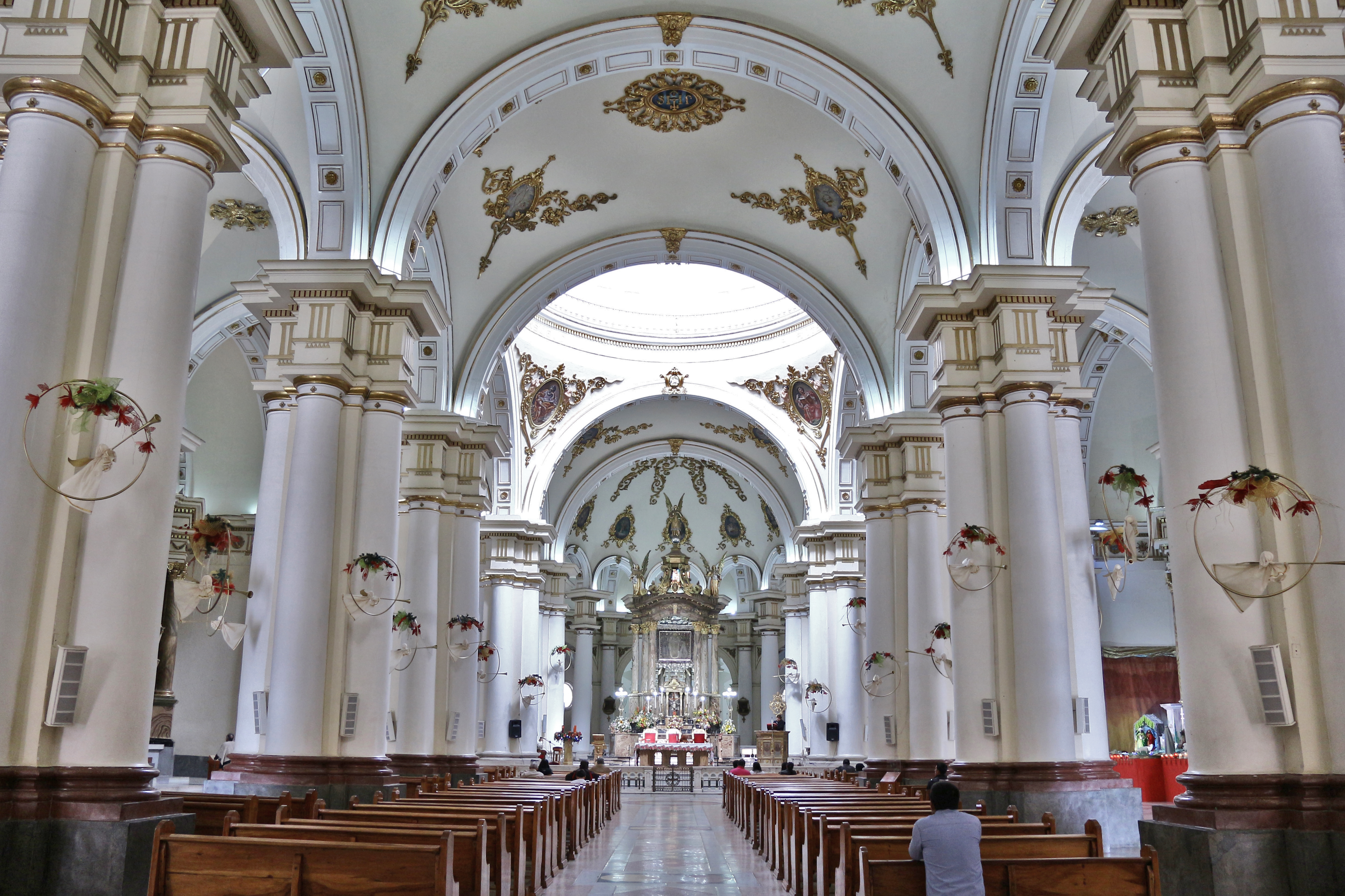 Basilica de Nuestra Señora del Rosario de Ciquinquirá. Ubicada en Chiquinquirá - Boyacá Colombia